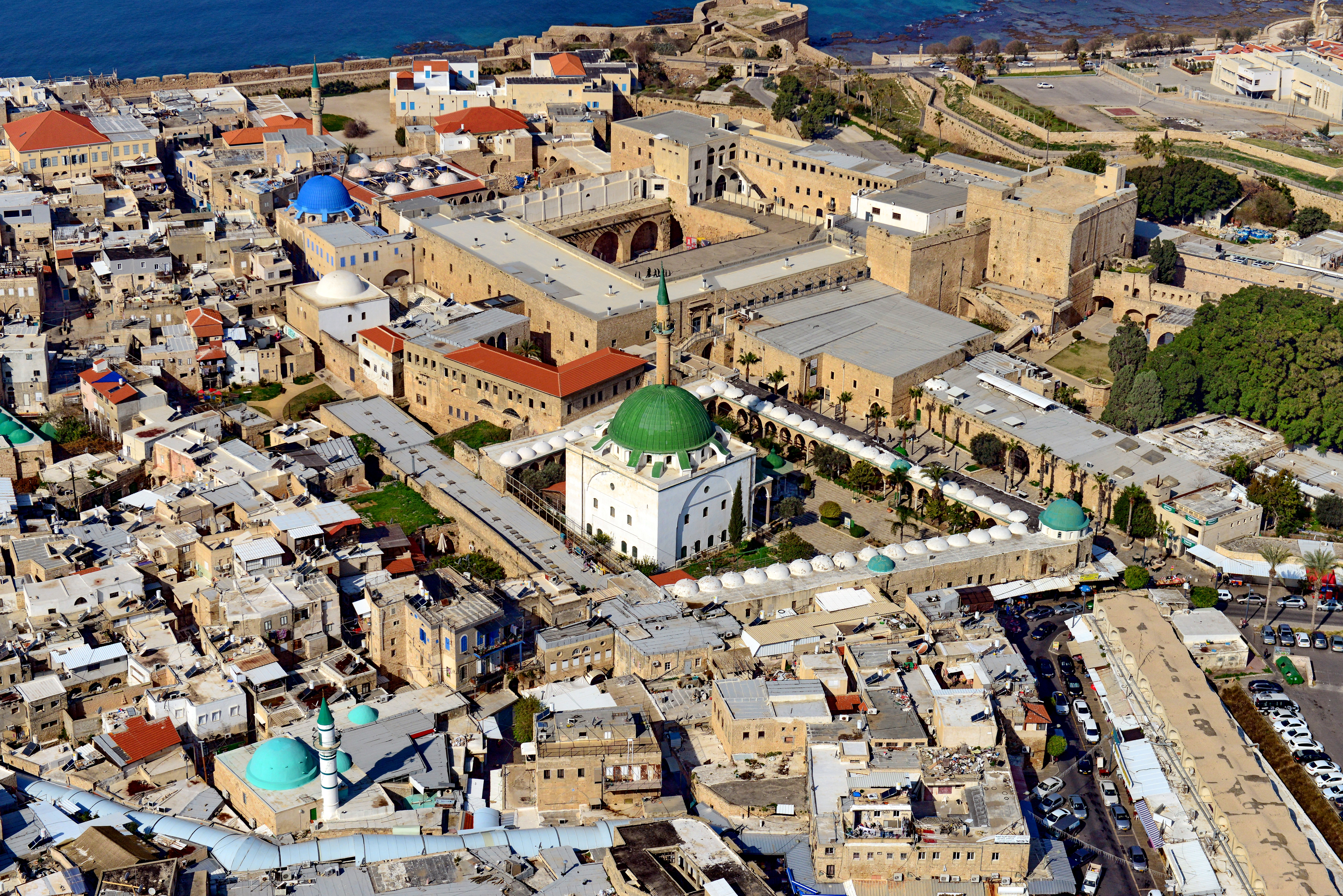 עכו היא אחת מערי הנמל העתיקות בעולם, ודברי ימיה המתועדים מתחילים בתקופת הברונזה הקדומה. במשך שנים רבות הייתה עיר מפתח לכיבוש ארץ ישראל, שכן מיקומה על רצועת החוף הרחבה אפשר גישה נוחה דרך הגליל אל פנים הארץ. היא ידעה עליות ומורדות ועברה מיד ליד פעמים רבות. עכו הגיעה לשיאה כאשר שימשה כבירת ממלכת ירושלים במאה ה-13 וכבירתו של אחמד אל-ג'זאר בסוף המאה ה-18.